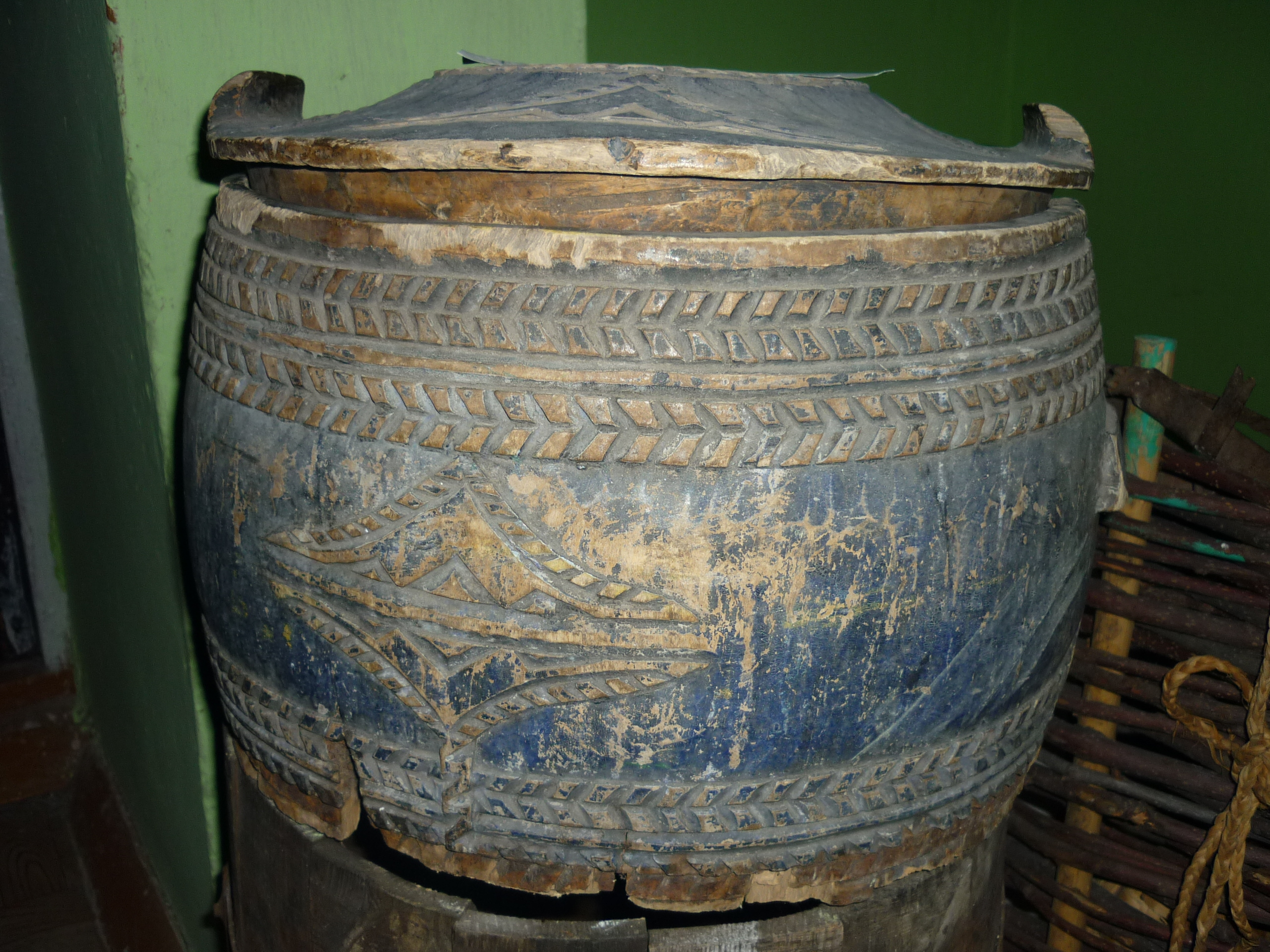 Башҡортса: Батман, көбө